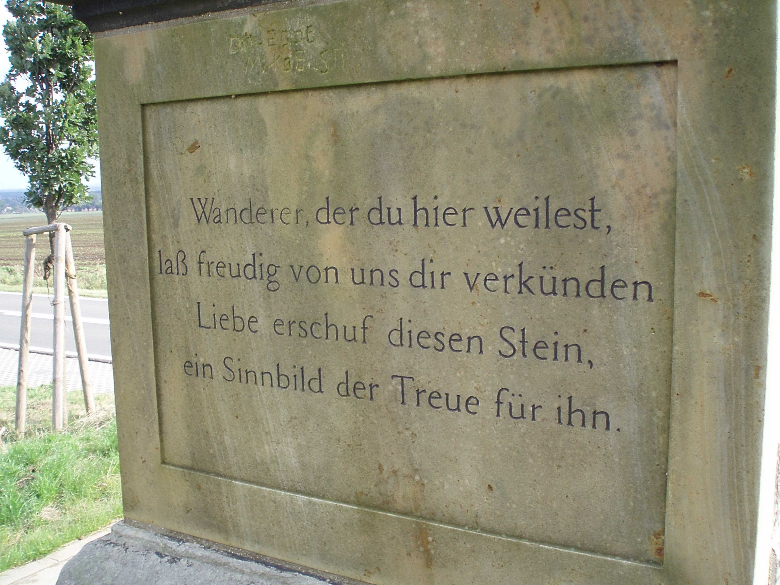 Inschrift dem Denkmal bei Giersleben